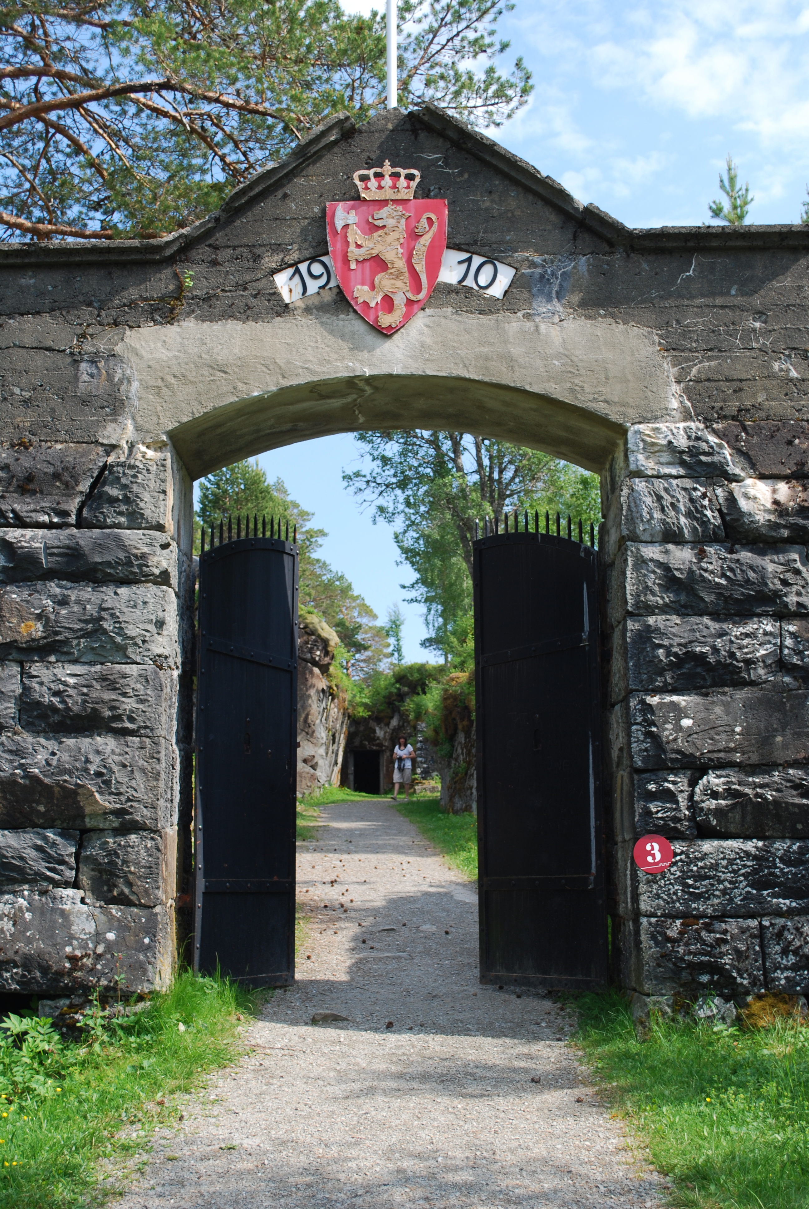 Inngangsportalen ved Hegra festning